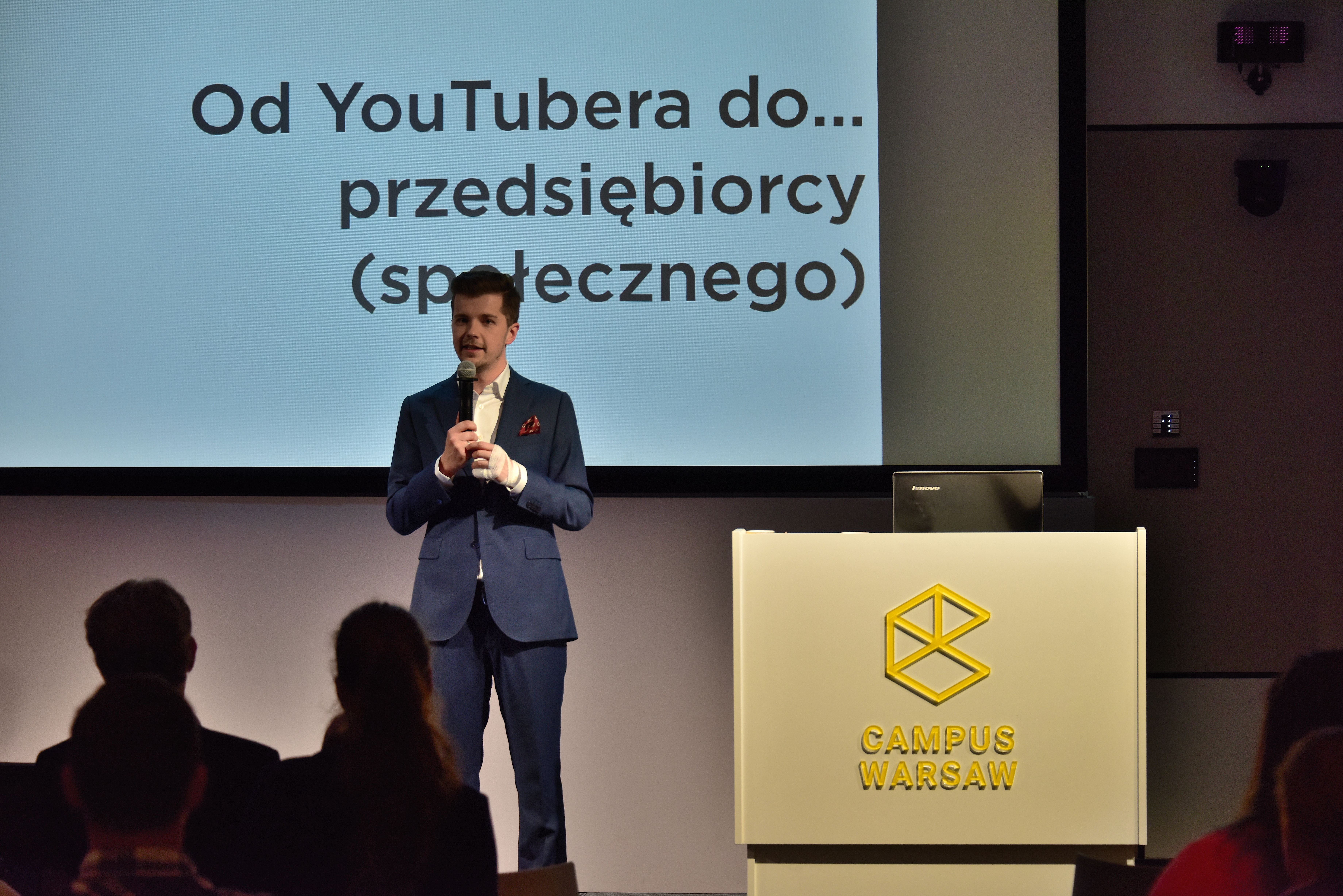 Radosław Kotarski podczas Pitch & Pizza Night zorganizowanego przez Fundację Humanity in Action w Campus Warsaw w Warszawie